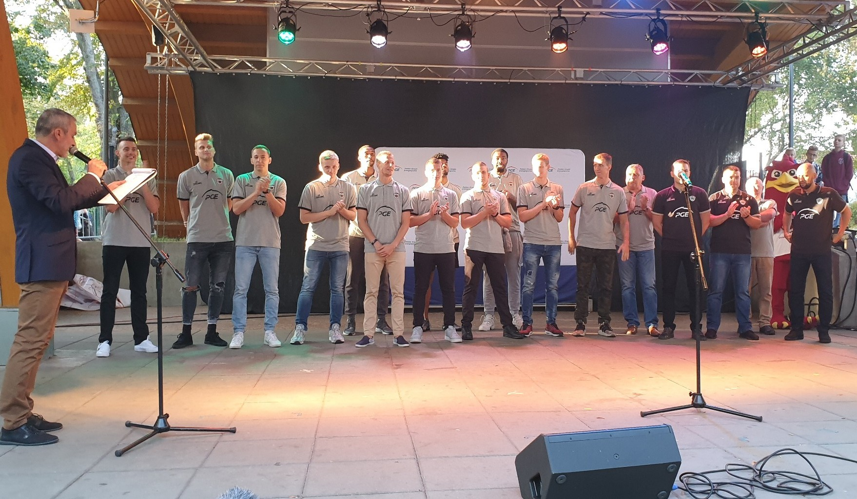 70-lecie Spójni Stargard. Prezentacja zespołu ekstraklasy